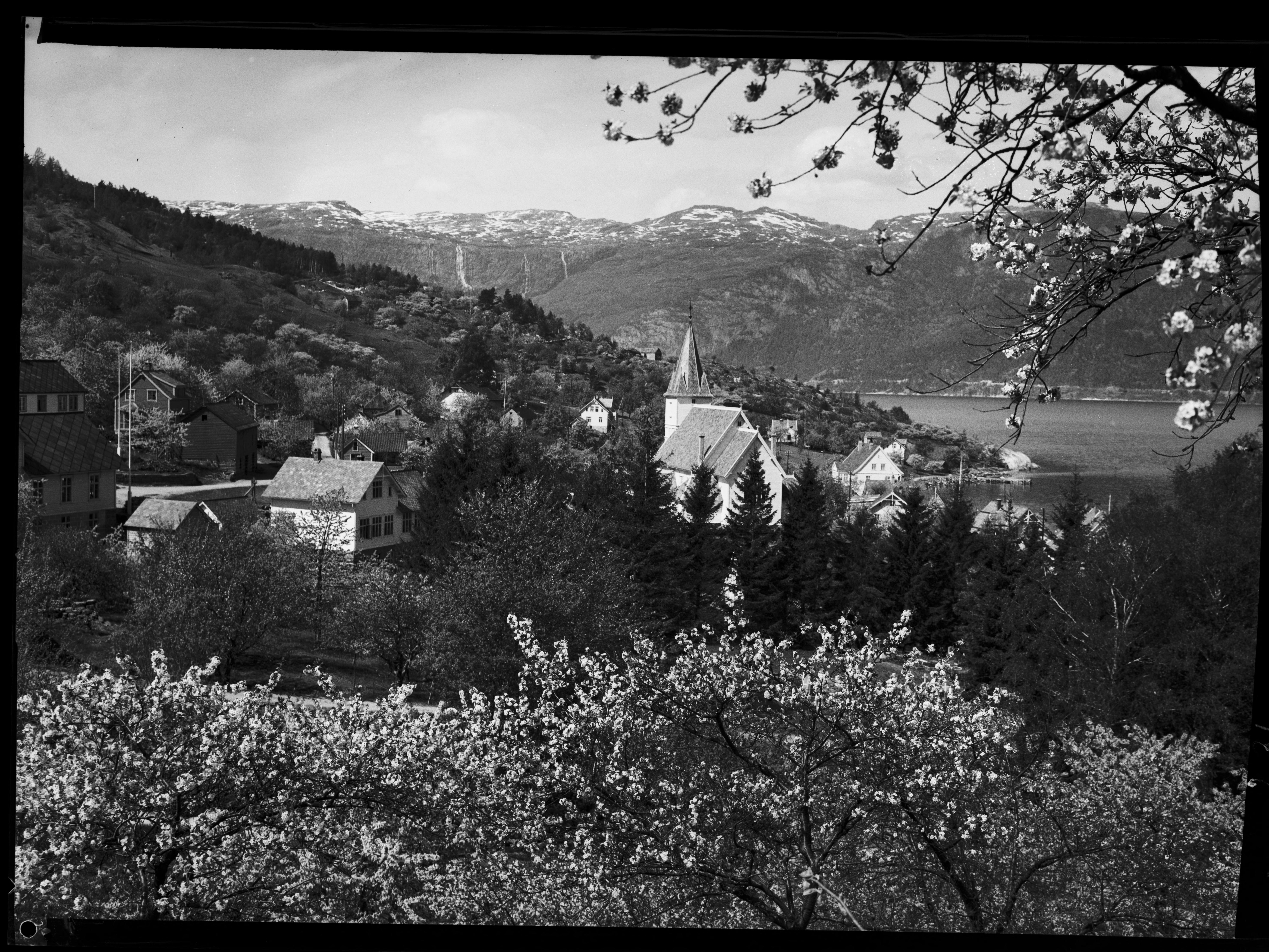 Bildet er hentet fra Nasjonalbibliotekets bildesamling. Anmerkninger til bildet var: Fotograf ukjent. Hardanger,Utne, Ullensvang, Hordaland